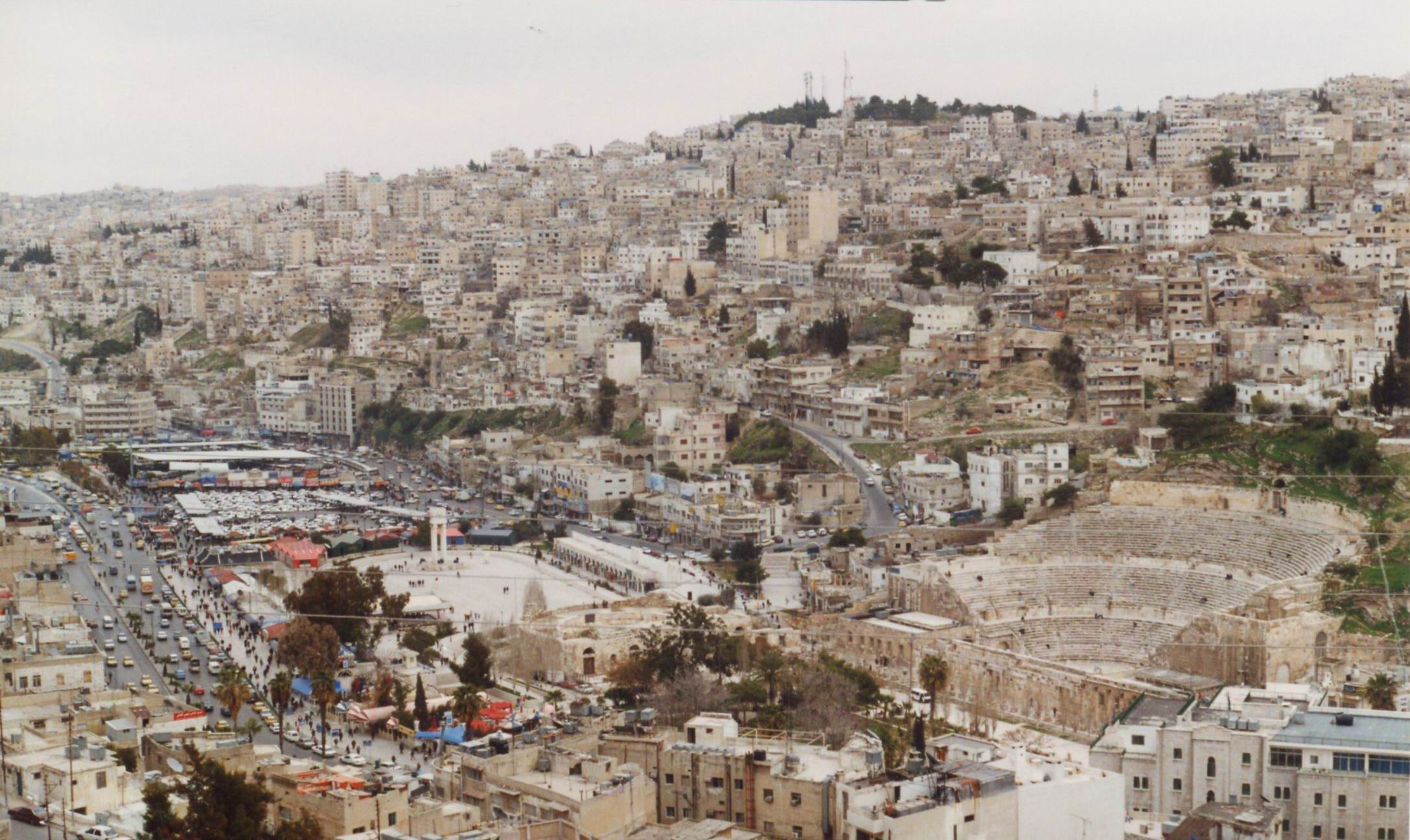 Amman, Jordanien / Hashemi Street und Römisches Theater Lizenz: GNU FDL Quelle: eigenes Foto